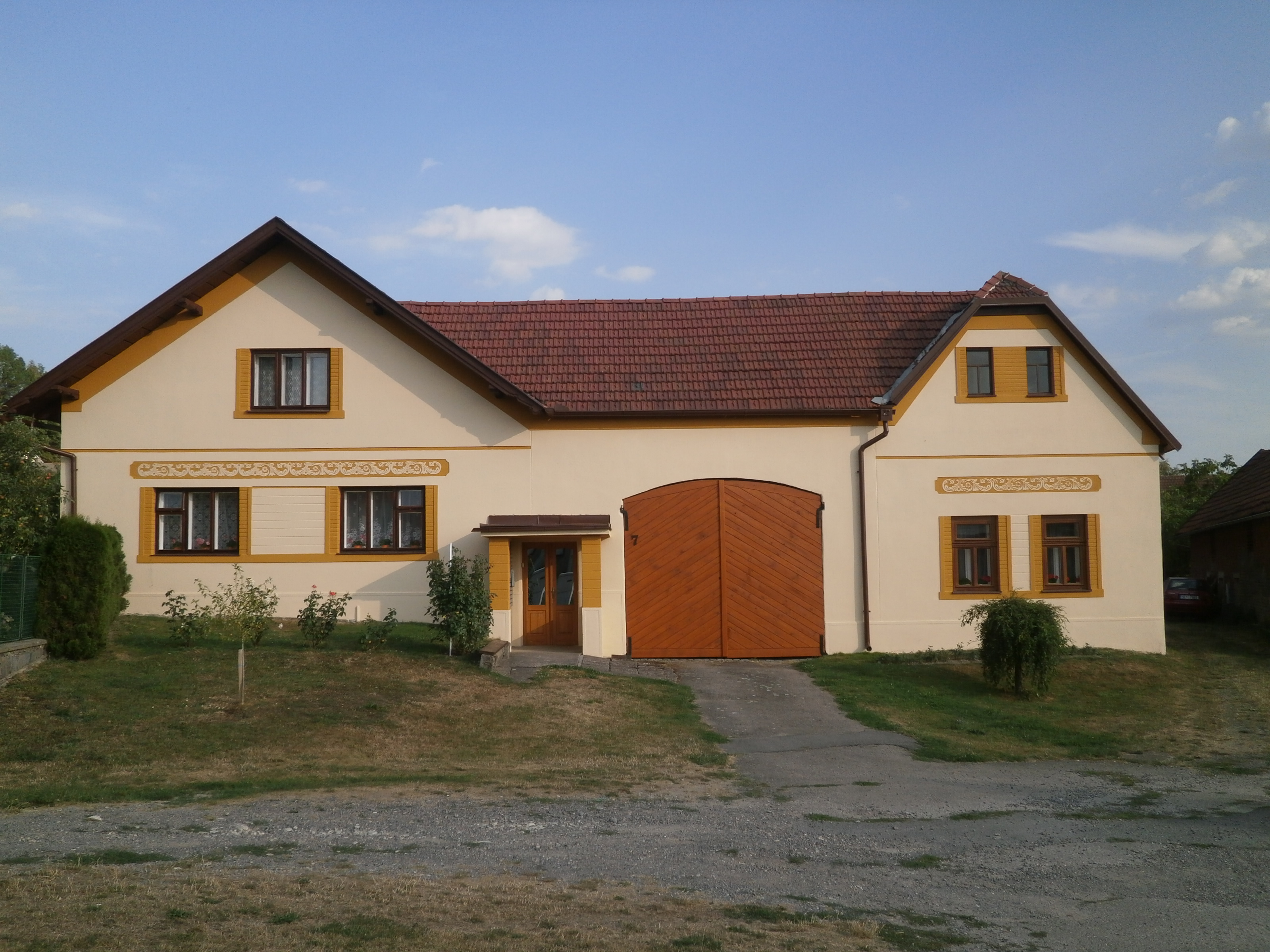 Leština - č.p. 7